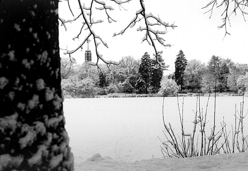 Grosshansdorf, Groten Diek mit Turm der Auferstehungskirche